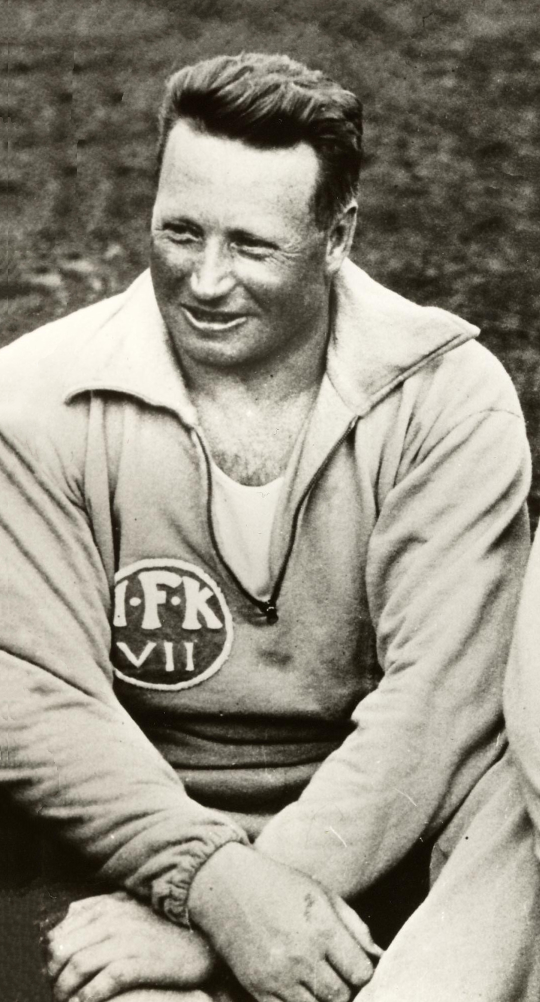 Gunnar Jansson (athlete)